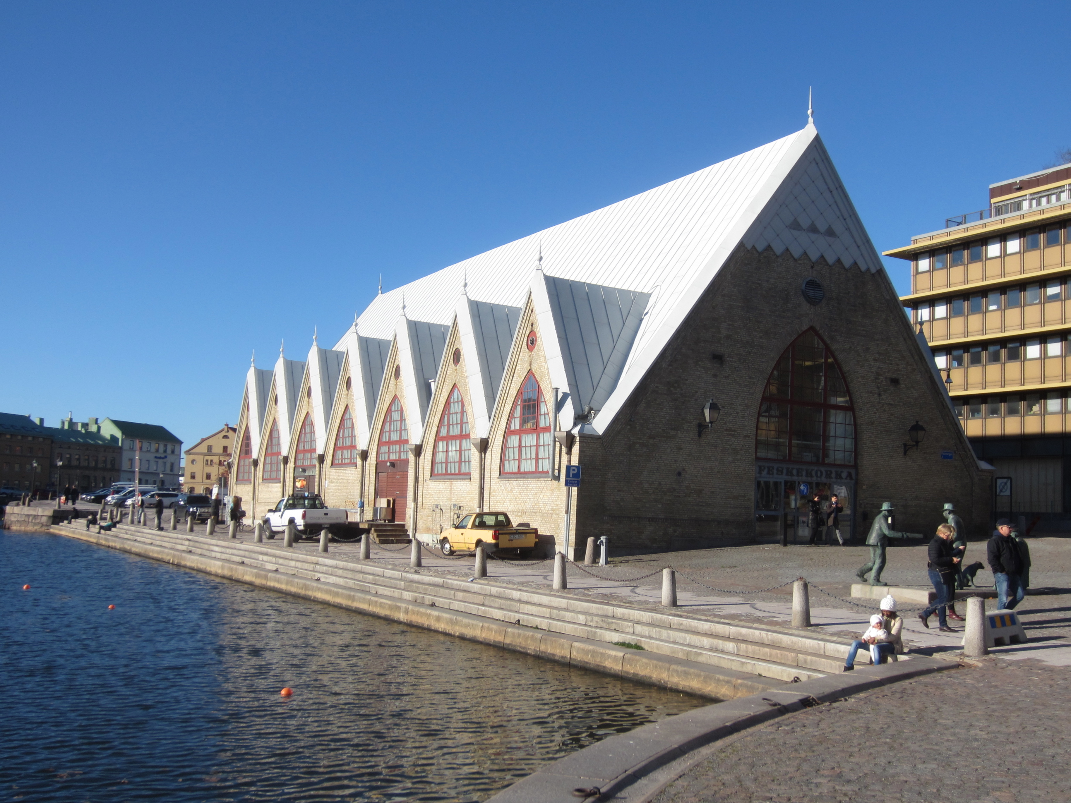 Feskekörka i centrala Göteborg.